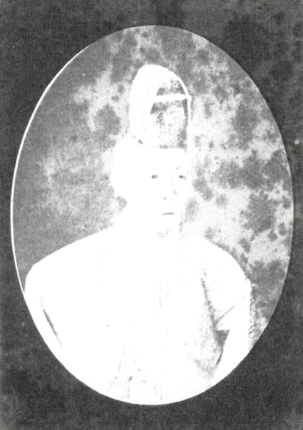 松平親良の肖像写真。